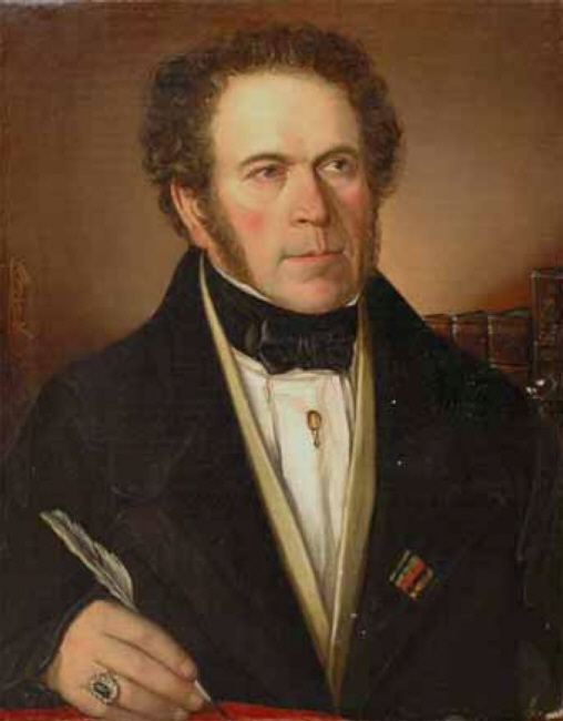 Bildnis Friedrich Mitterwurzer (1844–1897)title QS:P1476,de:"Bildnis Friedrich Mitterwurzer (1844–1897)" label QS:Lde,"Bildnis Friedrich Mitterwurzer (1844–1897)"